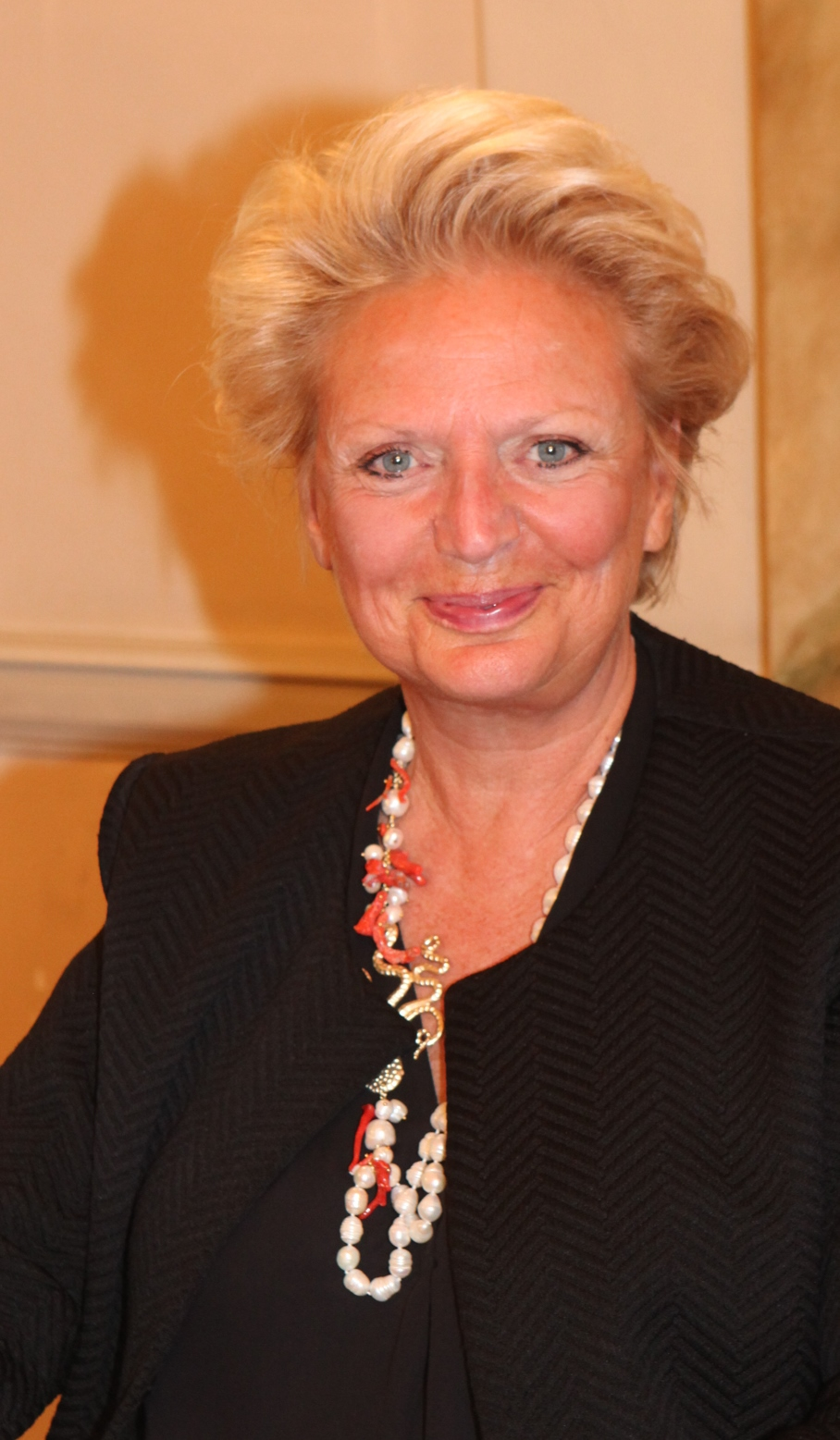 S.A.R. la Principessa Beatrice di Borbone delle Due Sicilie